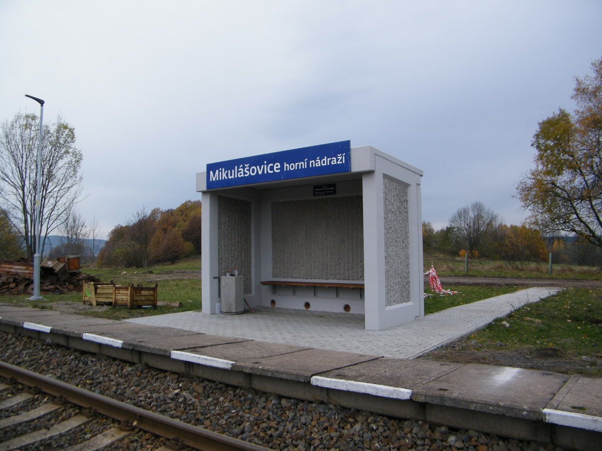 Mikulášovice horní nádraží